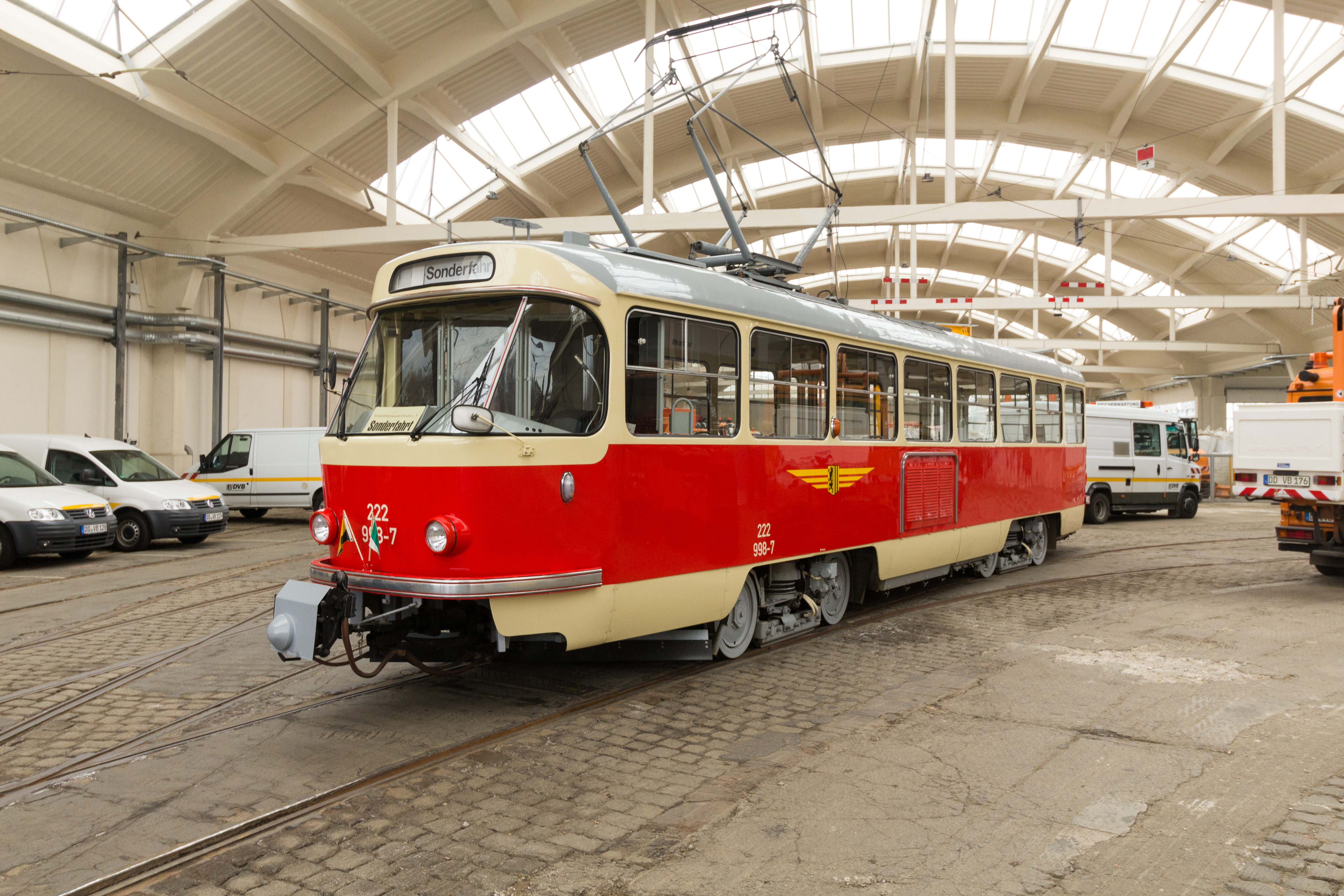 Straßenbahn 222 998-7 - im Betriebshof Waltherstraße